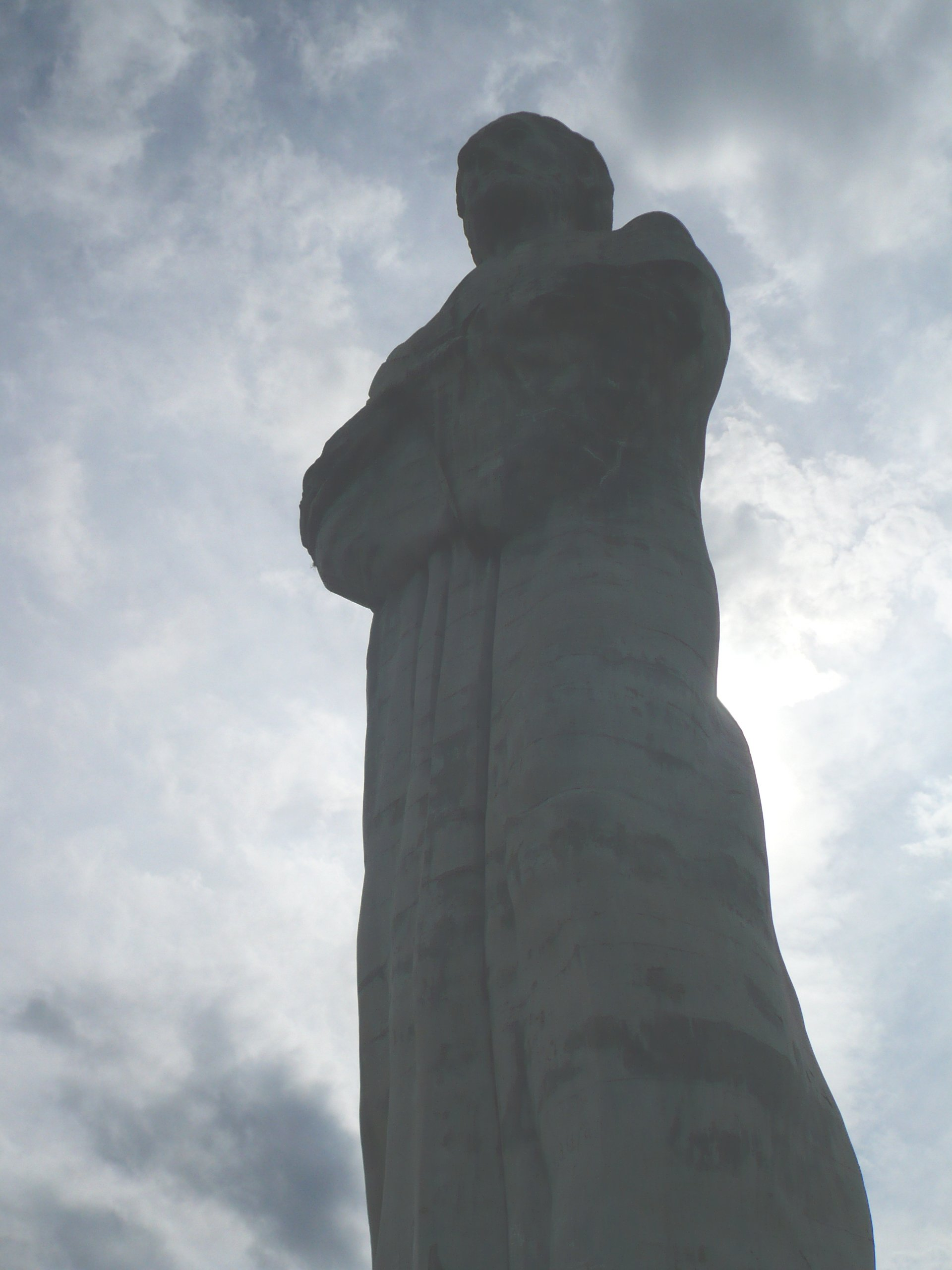 Cristo penitente de La Caldera, Salta, Argentina. El brillo de la estatua lo subí con gimp porque tenía el sol de frente y salió muy oscura